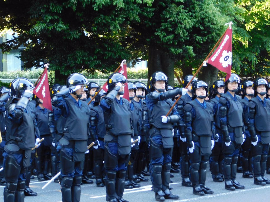 警視庁第2機動隊の受閲部隊。2017年機動隊観閲式で撮影。